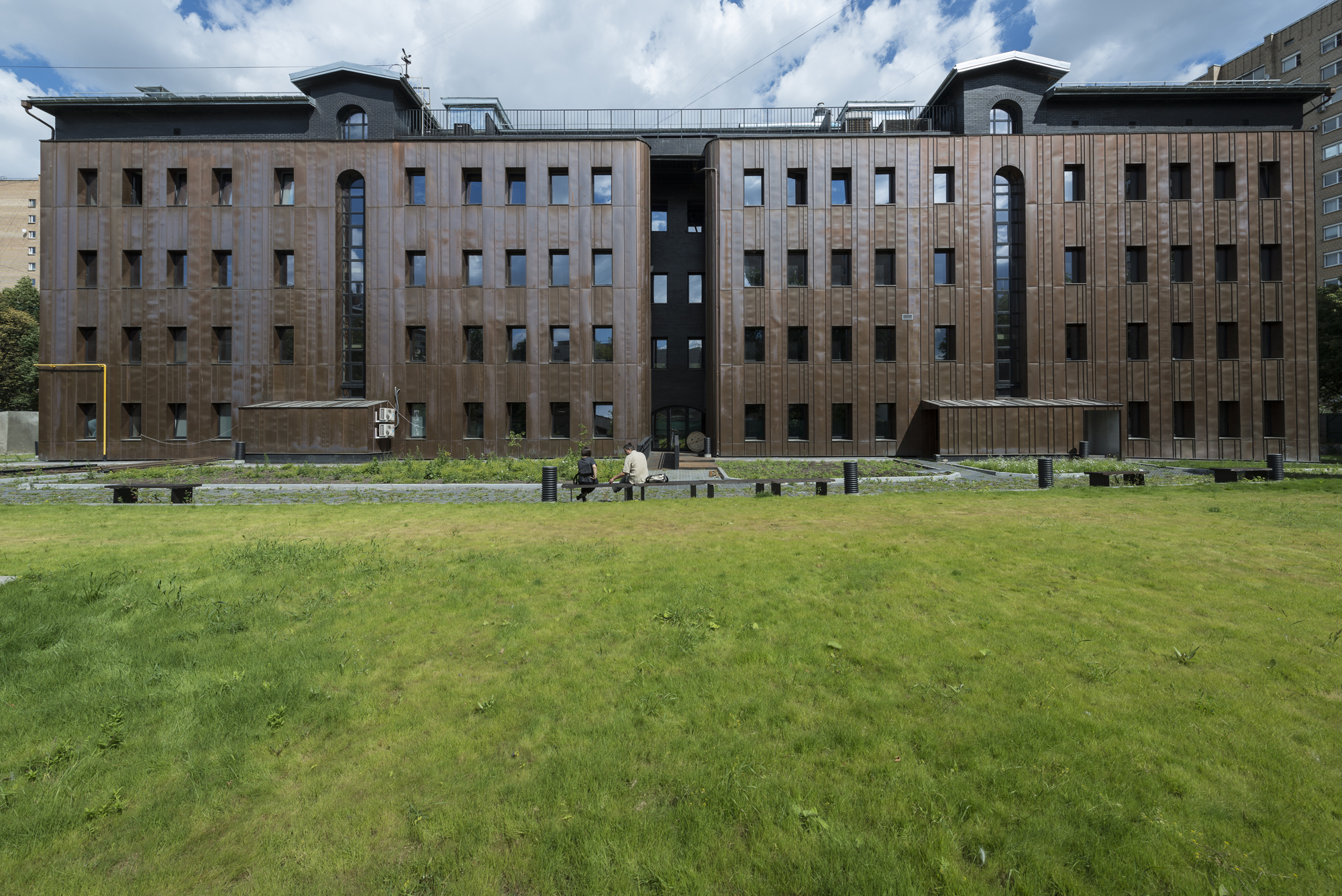 Фасад здания Музея истории ГУЛАГа